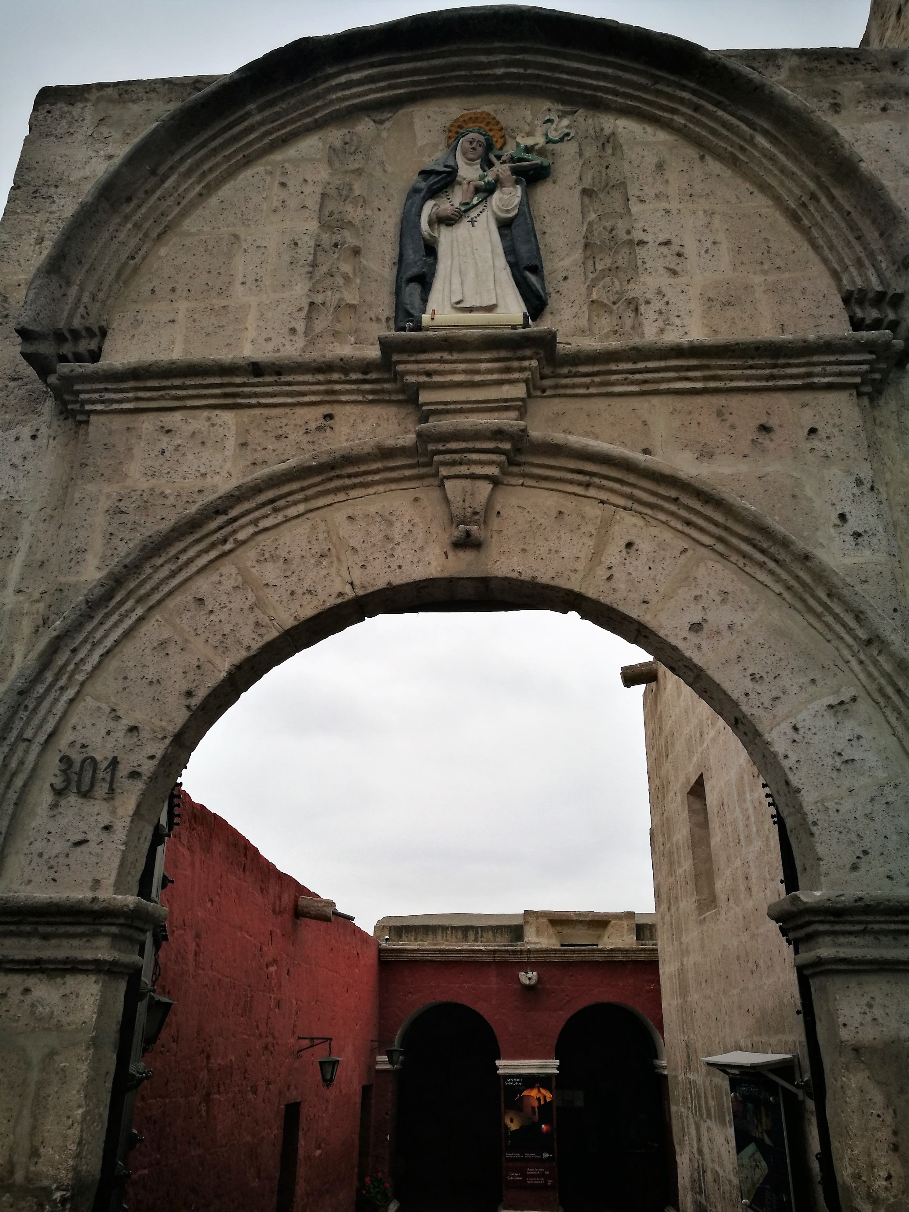 Entrada al monestir de santa Catalina des del carrer homònim amb imatge de la santa